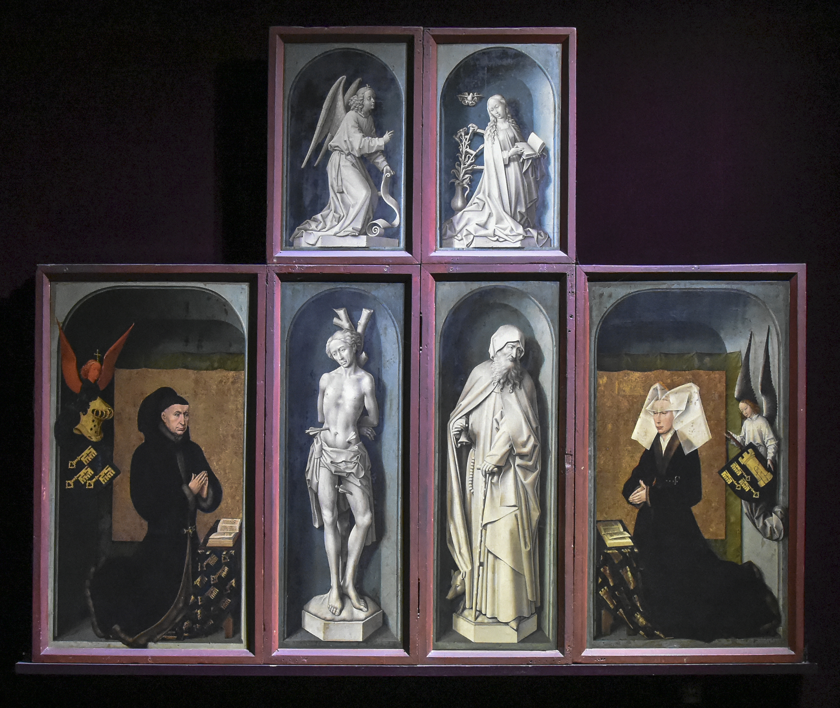 Rogier van der Weyden (1399of1400-1464) Het Laatste Oordeel gesloten luiken - Hôtel-Dieu Beaune